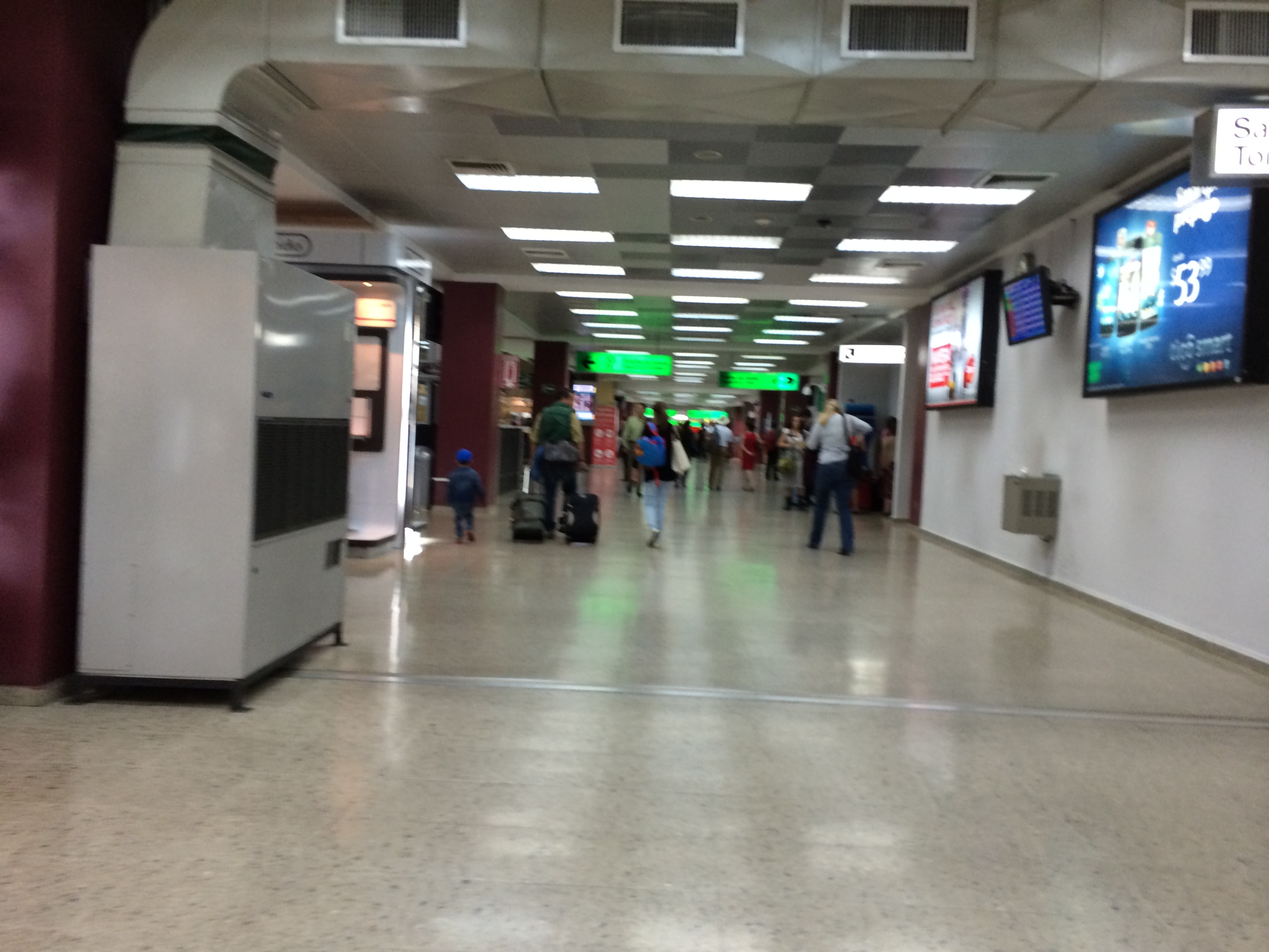 Pasillo principal del Aeropuerto Internacional de El Salvador.